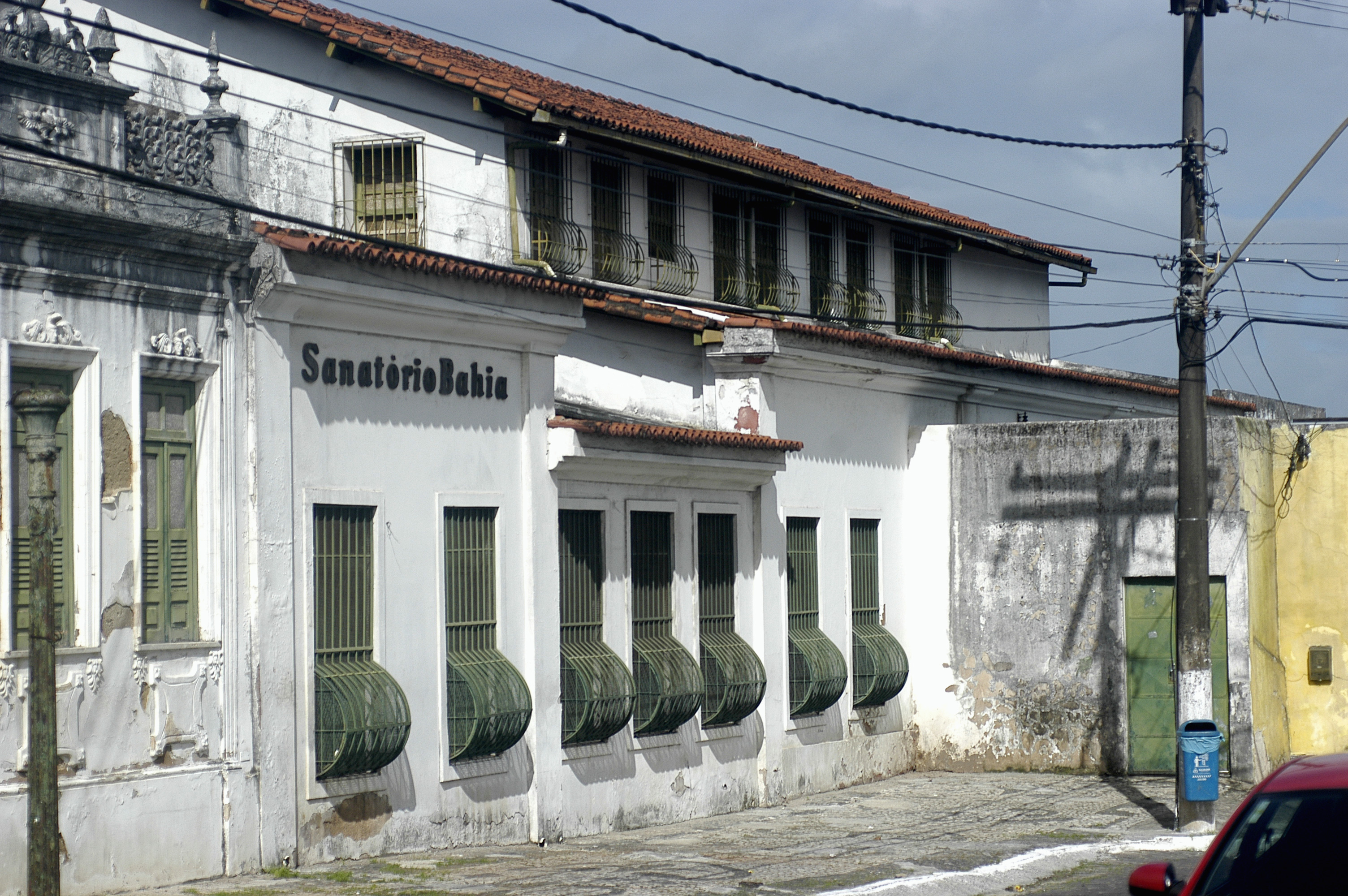 Sanatório Bahia, (hospital psiquiátrico) inaugurado em 1944 fechado em 2005